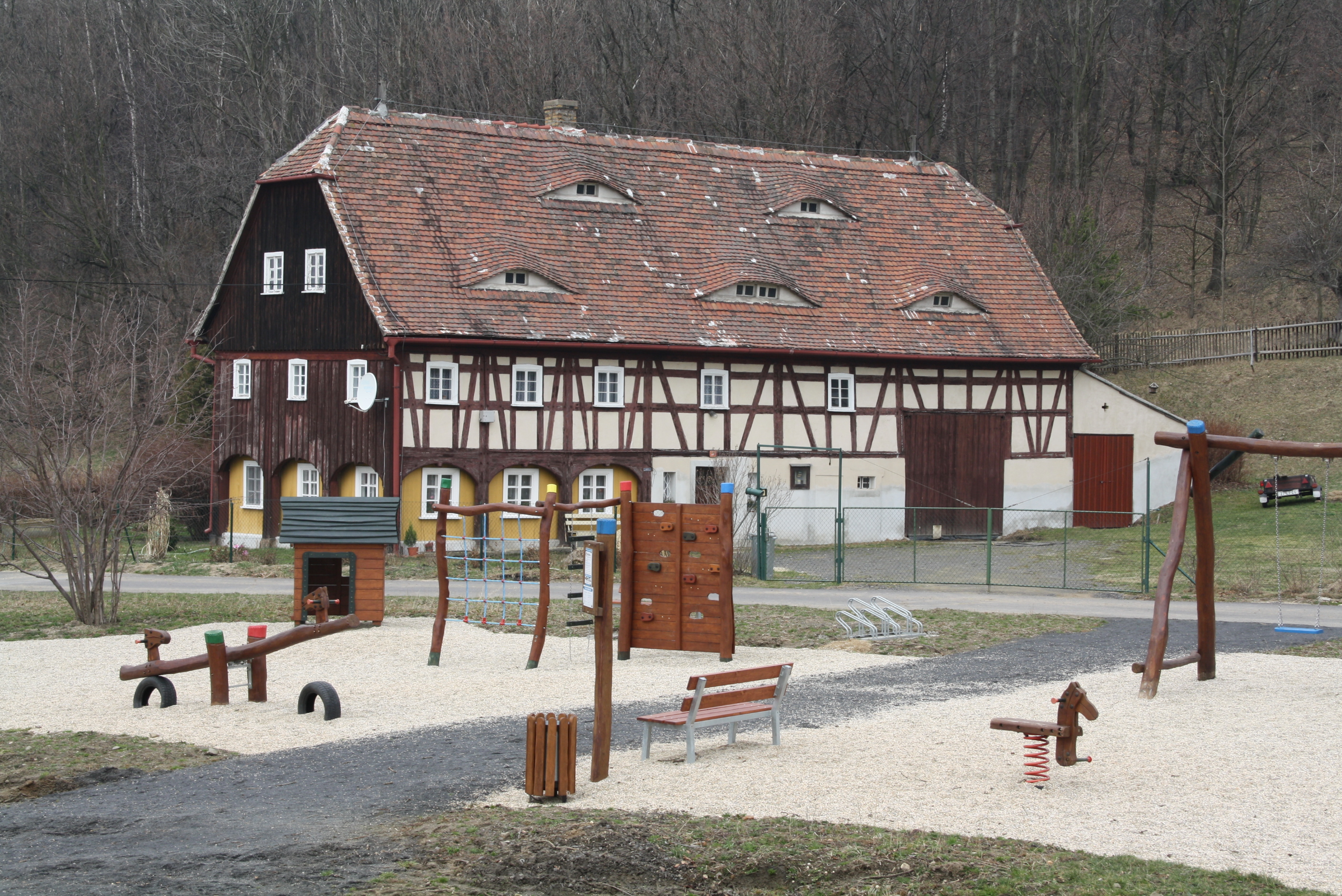 Dům čp. 77, Heřmanice 77, střed obce, Heřmanice (okres Liberec).